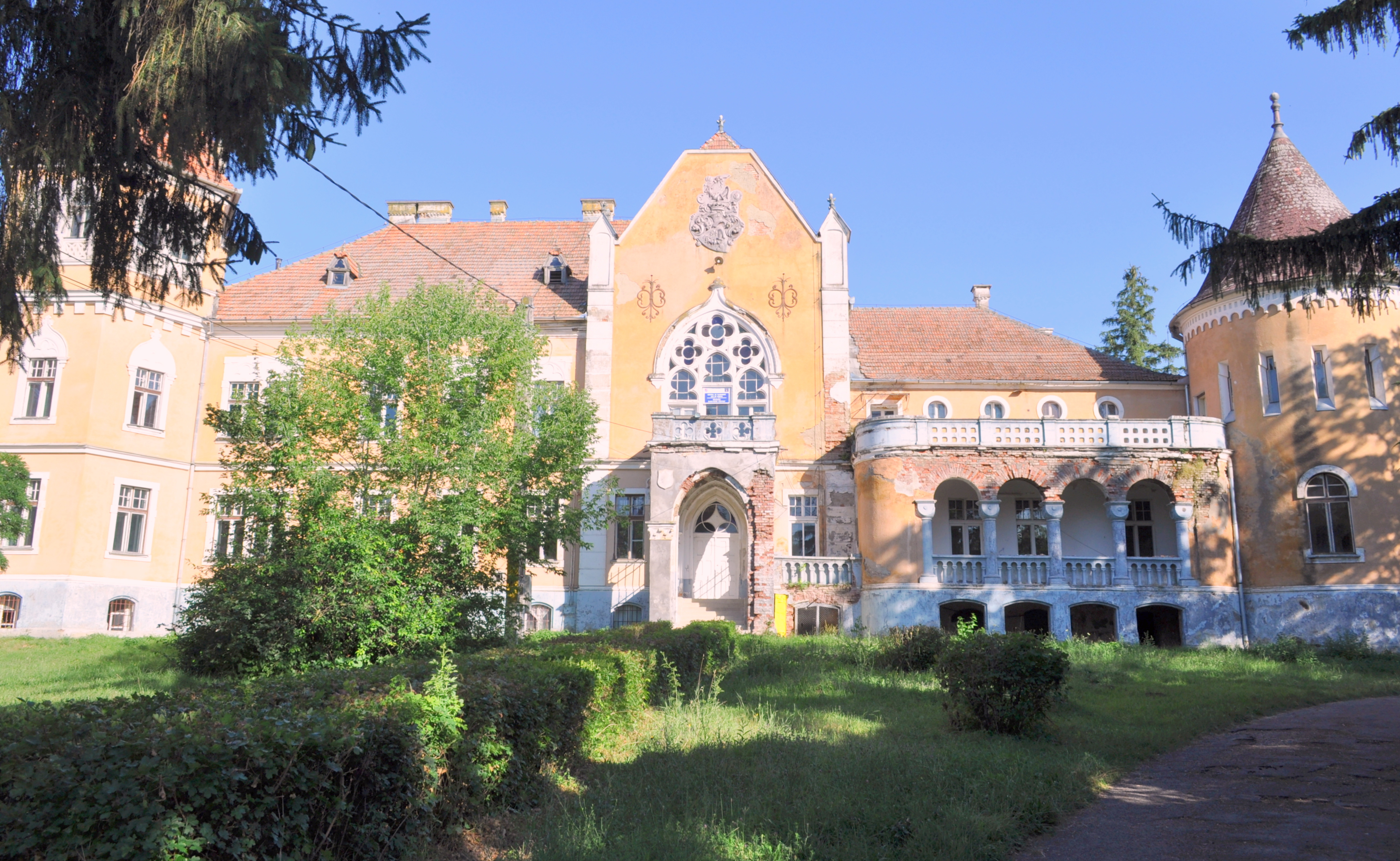 Ansamblul castelului Ugron, sat Zau de Câmpie; comuna Zau de Câmpie